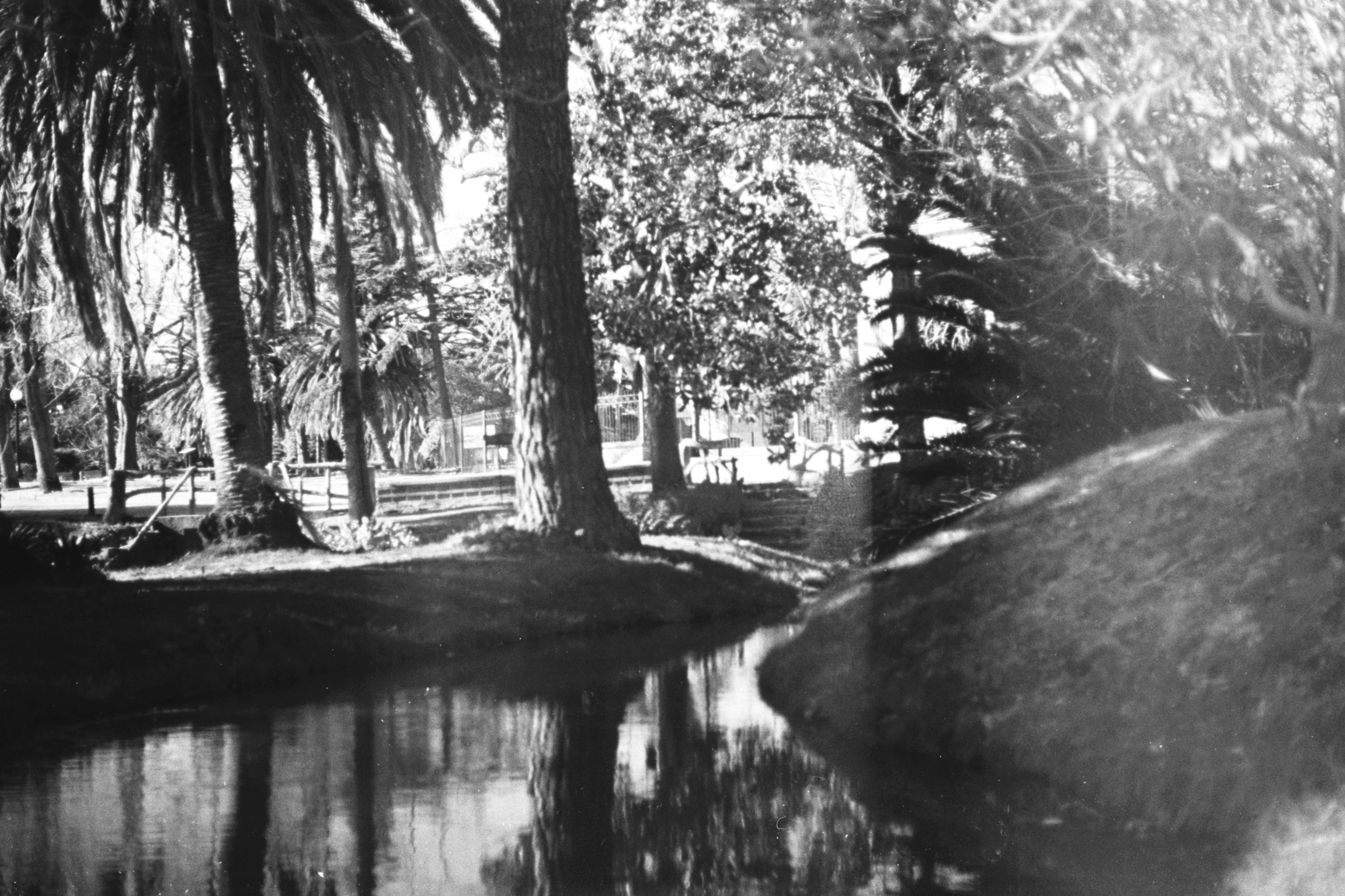 Parque José Enrique Rodó - ex Parque Urbano. Ubicada en el departamento de Montevideo